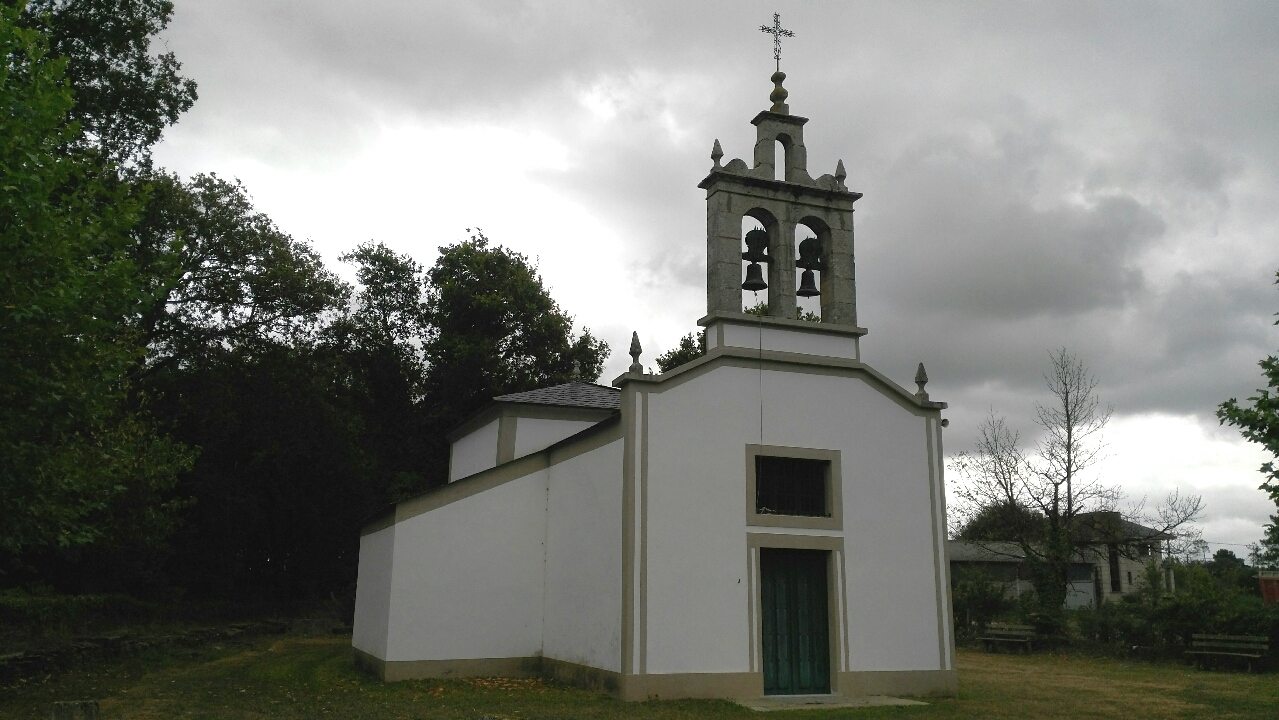 Igrexa da Ribeira, Ribeiras de Lea, Castro de Rei